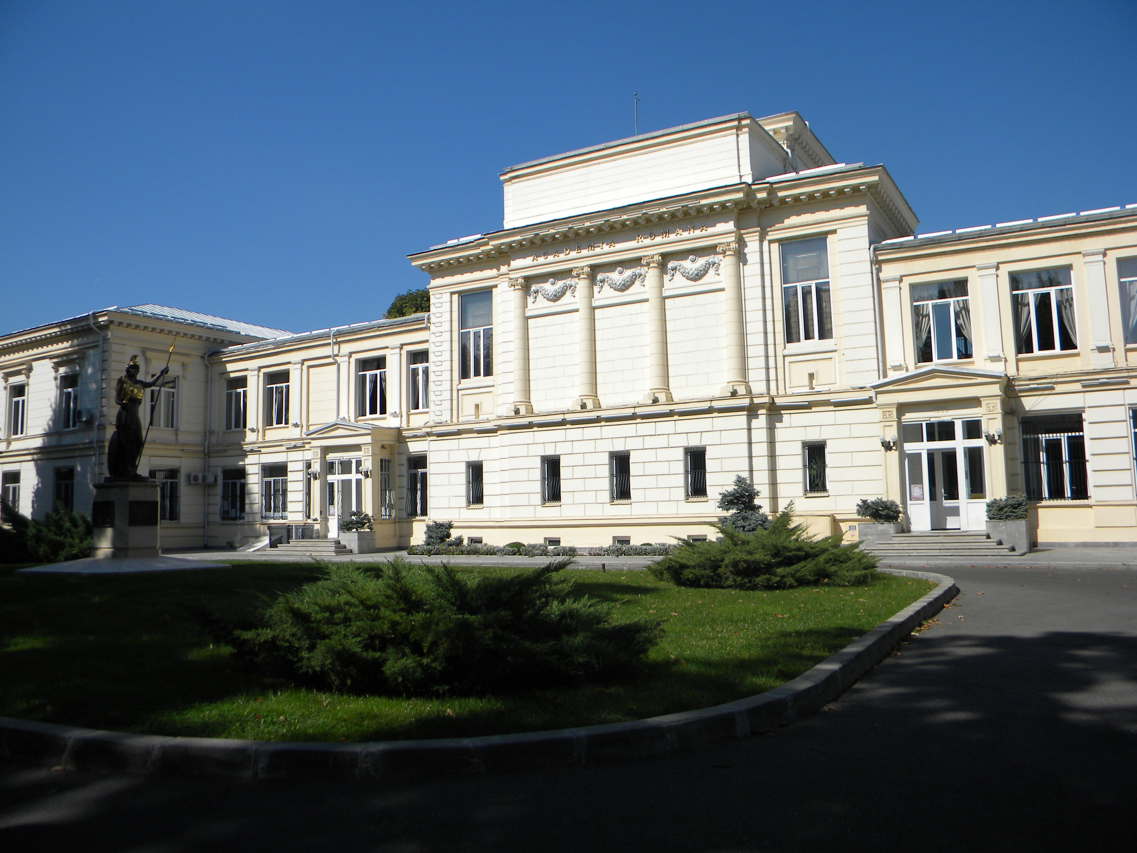 Bucuresti, Romania, Academia Romana, Calea Victoriei, nr. 121-127, sect. 1 (Vedere de ansamblu) 01